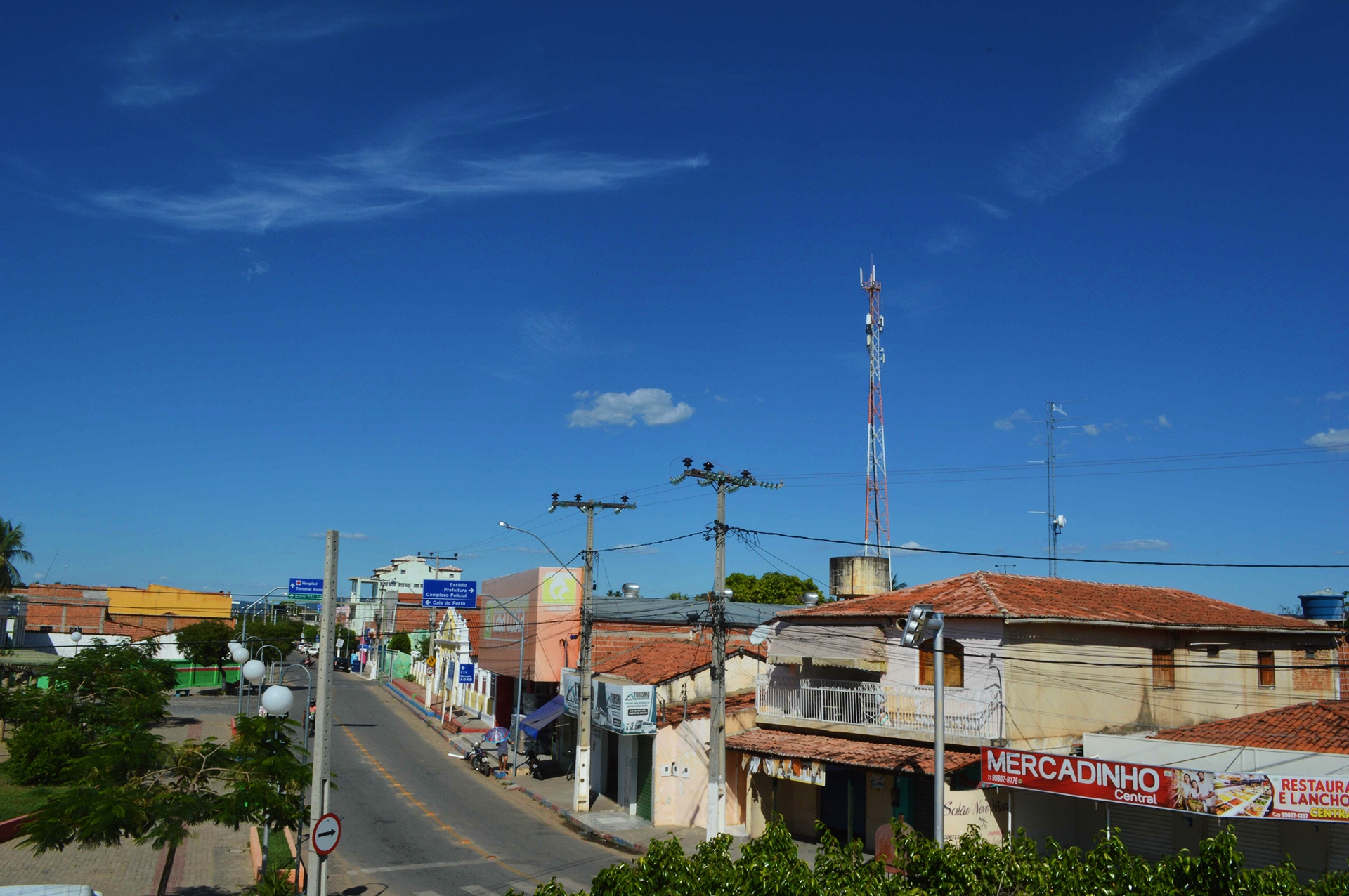 Vista da Av. Manoel Novais em Paratinga, janeiro de 2020.